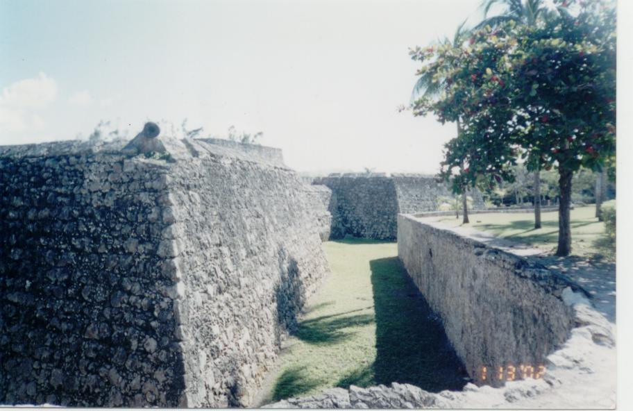 Fuerte de San Felipe, Bacalar, Quintana Roo, México